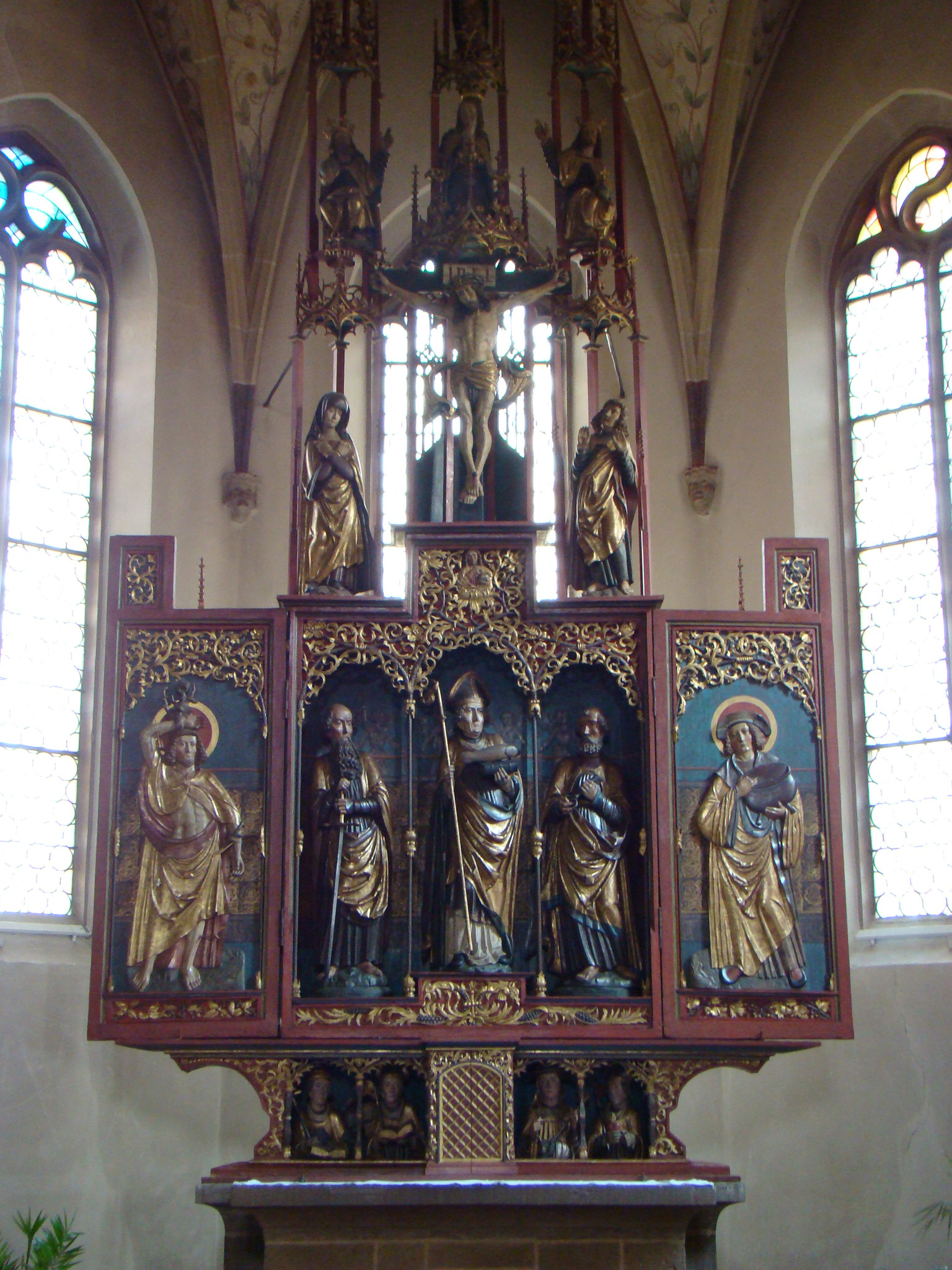 Altar von St. Ulrich in Stockheim